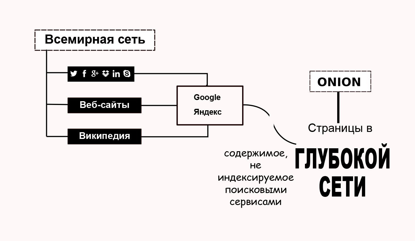 Диаграмма глубокого интернета